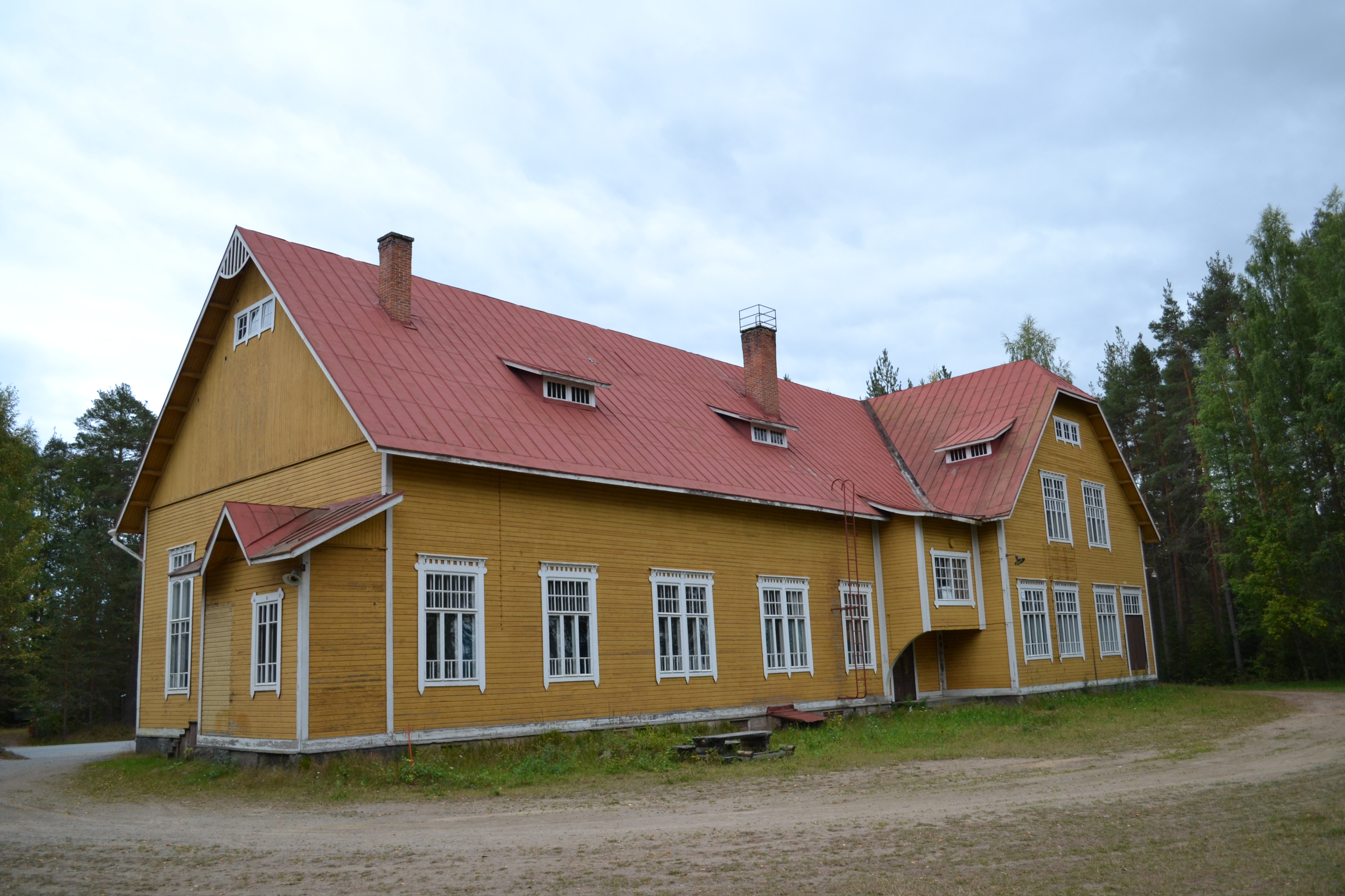 Haapamäen vanha yhteiskoulu